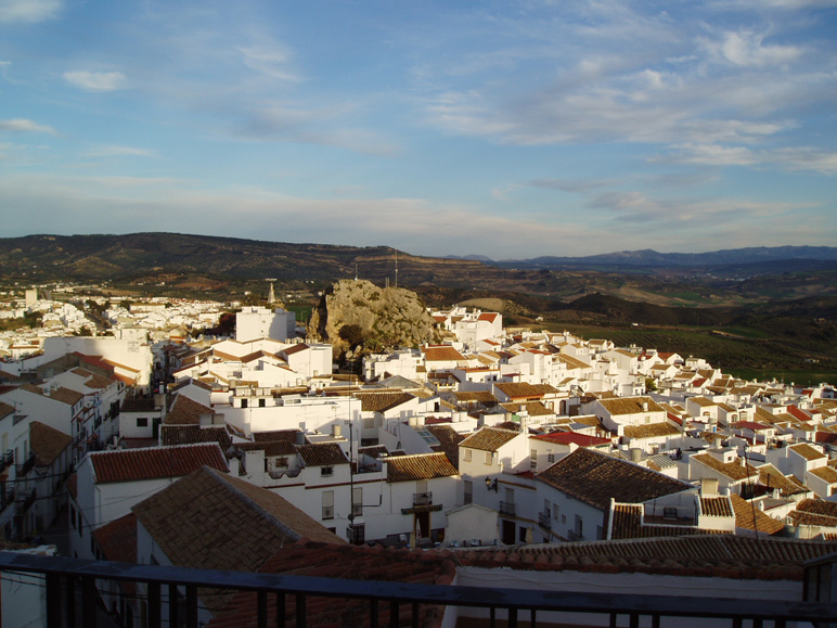 Panorámica de Olvera, municipio de la Sierra de Cádiz. Andalucía, España.